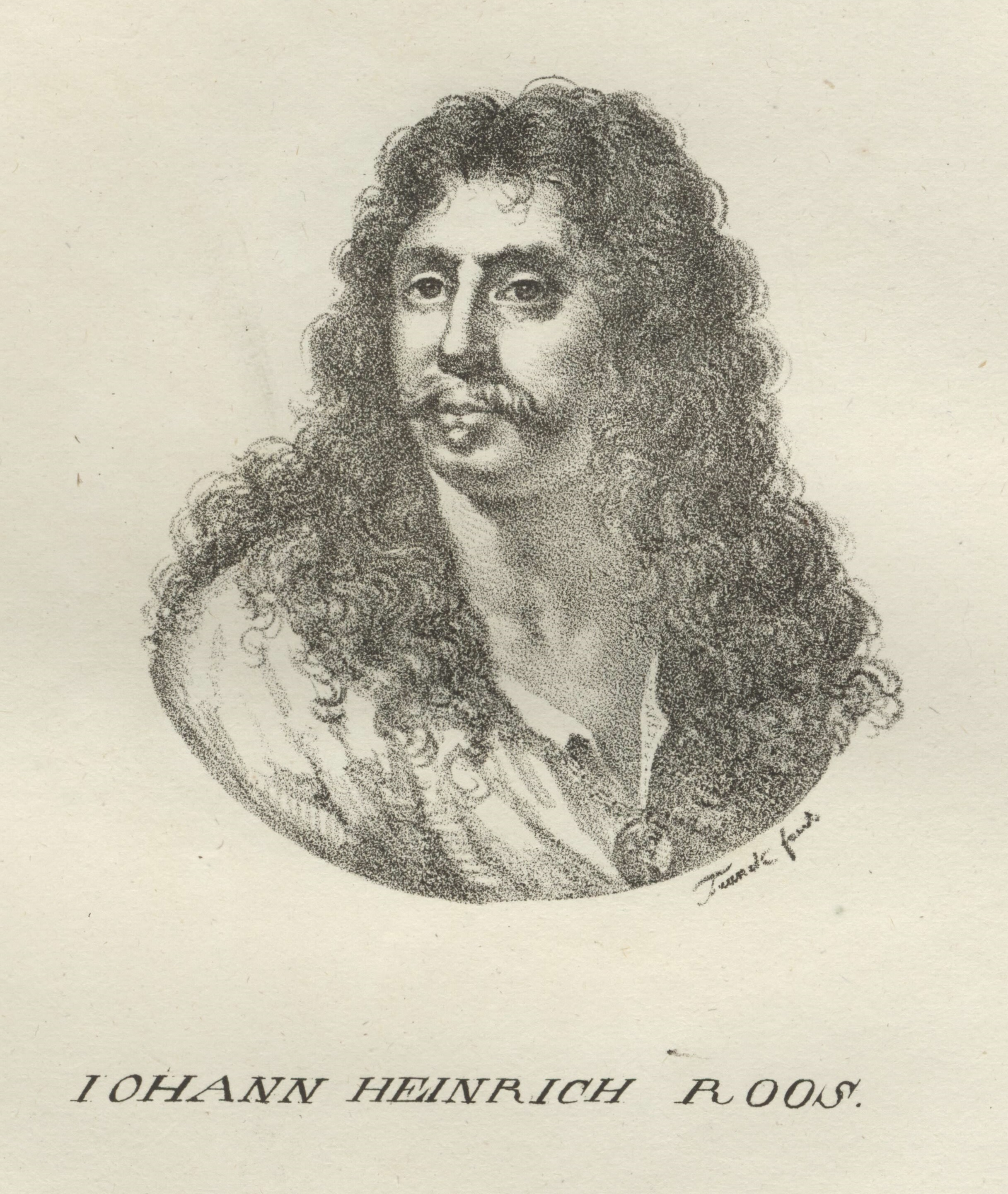 Porträt von Johann Heinrich Roos